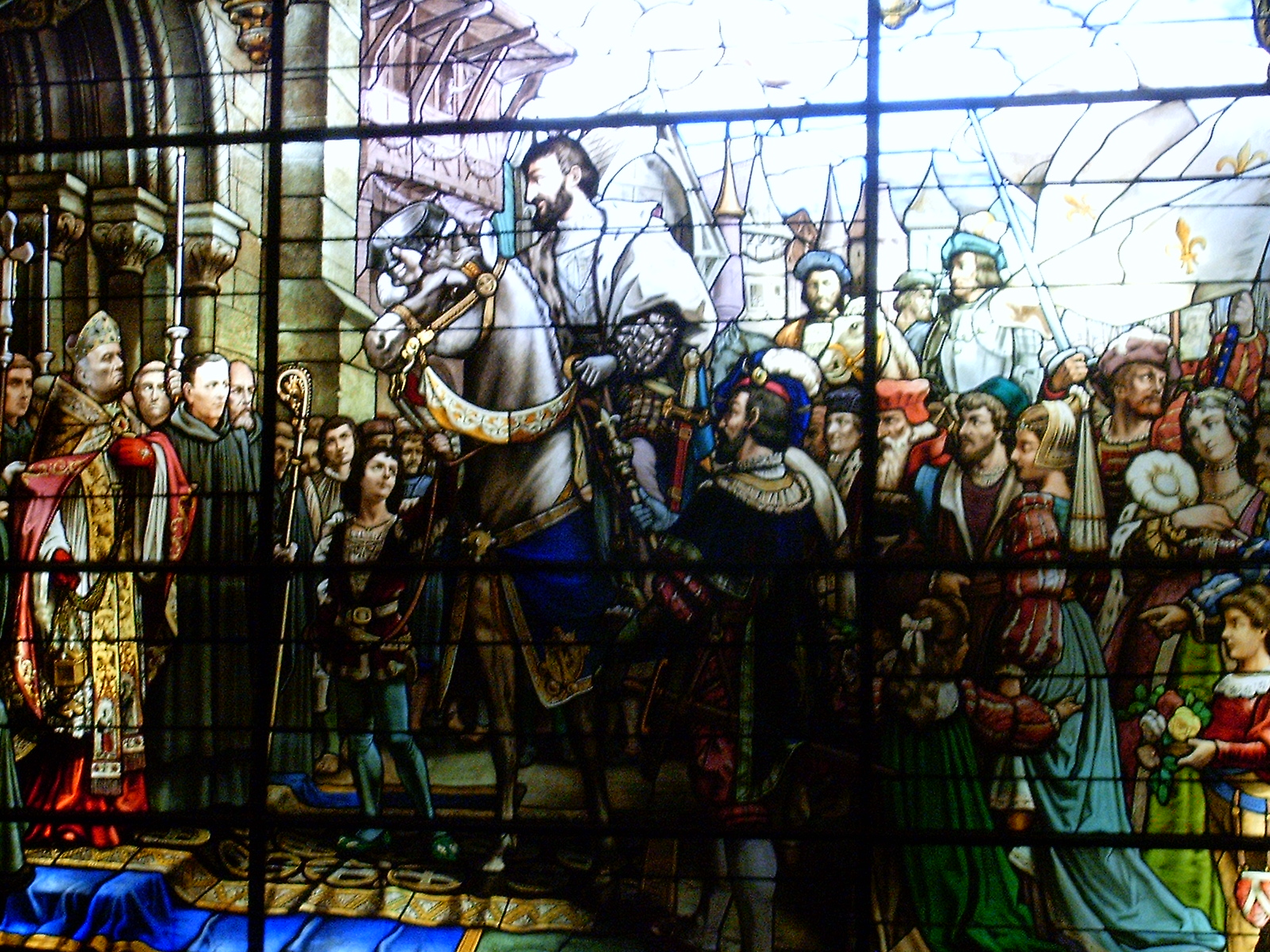 Vitrail montrant la venue de François Ier à Fécamp (Palais Bénédictine)